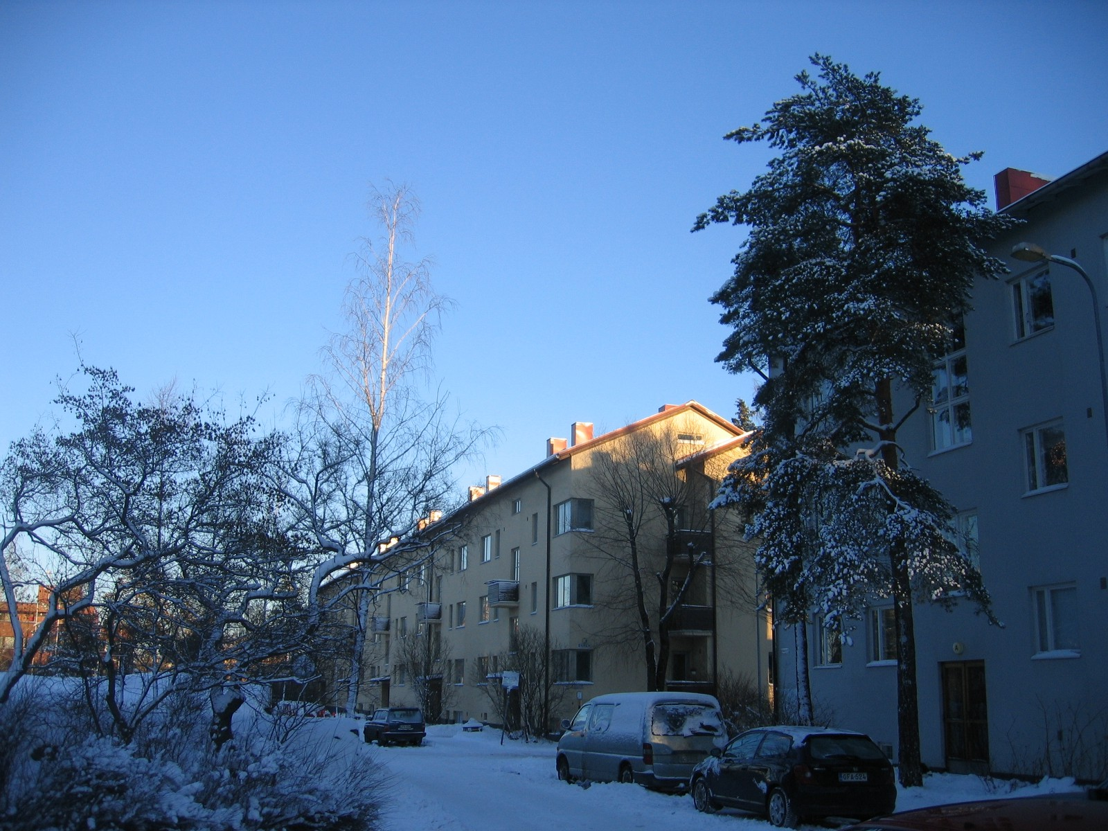 1952 Olympic Village in Käpylä in Helsinki, Finland